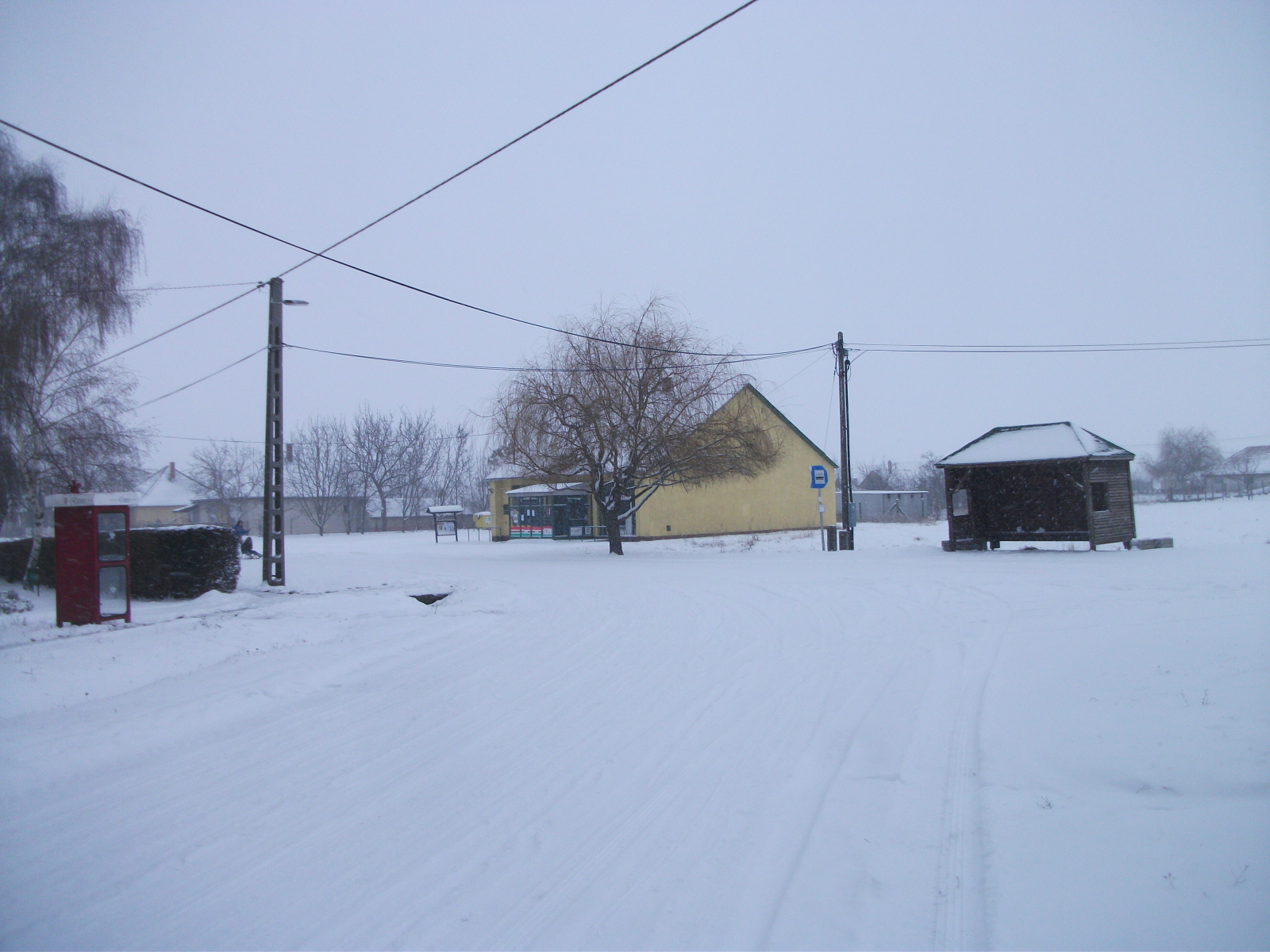 A képen a sárga épület Zichyújfalu egyik boltja (Coop), s a kép jobb oldalán látható az egyik buszmegállóhely. A kép az Iskola utca és az Ady Endre utca kereszteződésénél készült